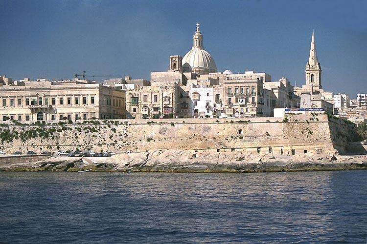 Le centre historique de La Valette (photo Gérard GRANDJEAN)